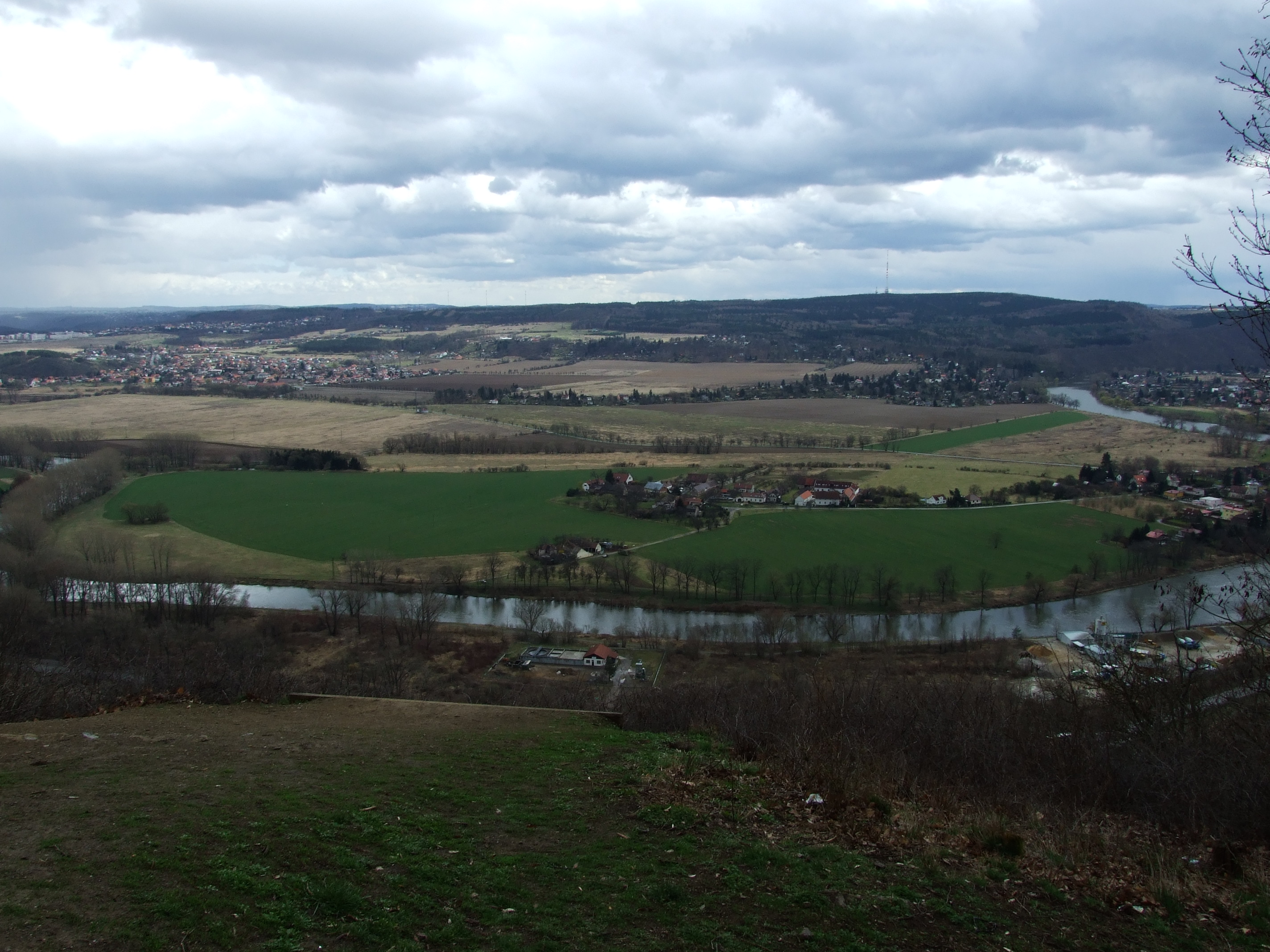 Pohled na lipeneckou část Černošic, která je již součástí Prahy